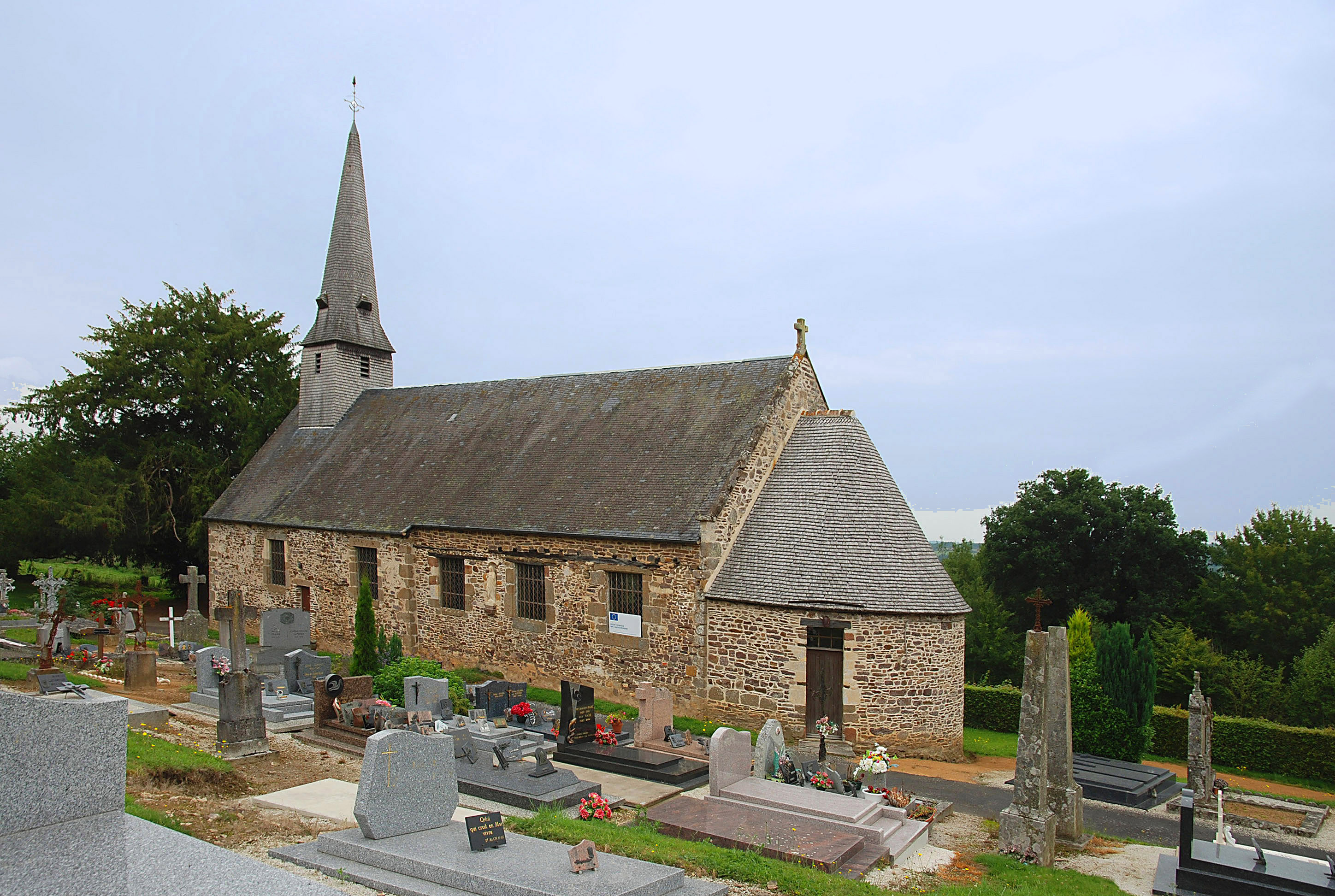 Église Saint-Philbert de Saint-Philbert-sur-Orne (Orne)